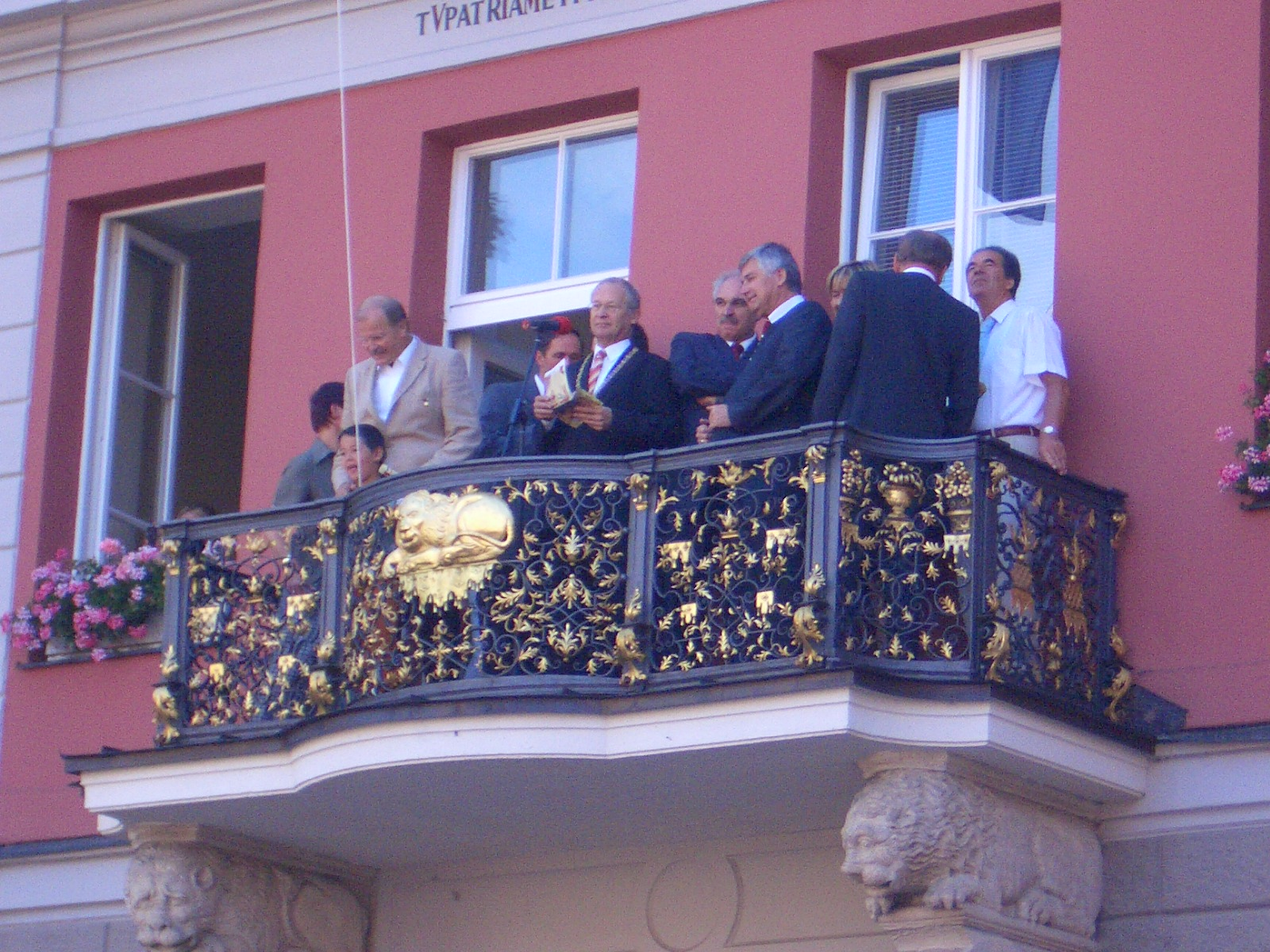 Das Memminger Kinderfest, die Stadtpromminenz auf dem Balkon der Großzunft, von links: Herbert Müller (SPD, MdL), Oberbürgermeister Dr. Ivo Holzinger (SPD), 2. Bürgermeister Hans Ferk (CSU)